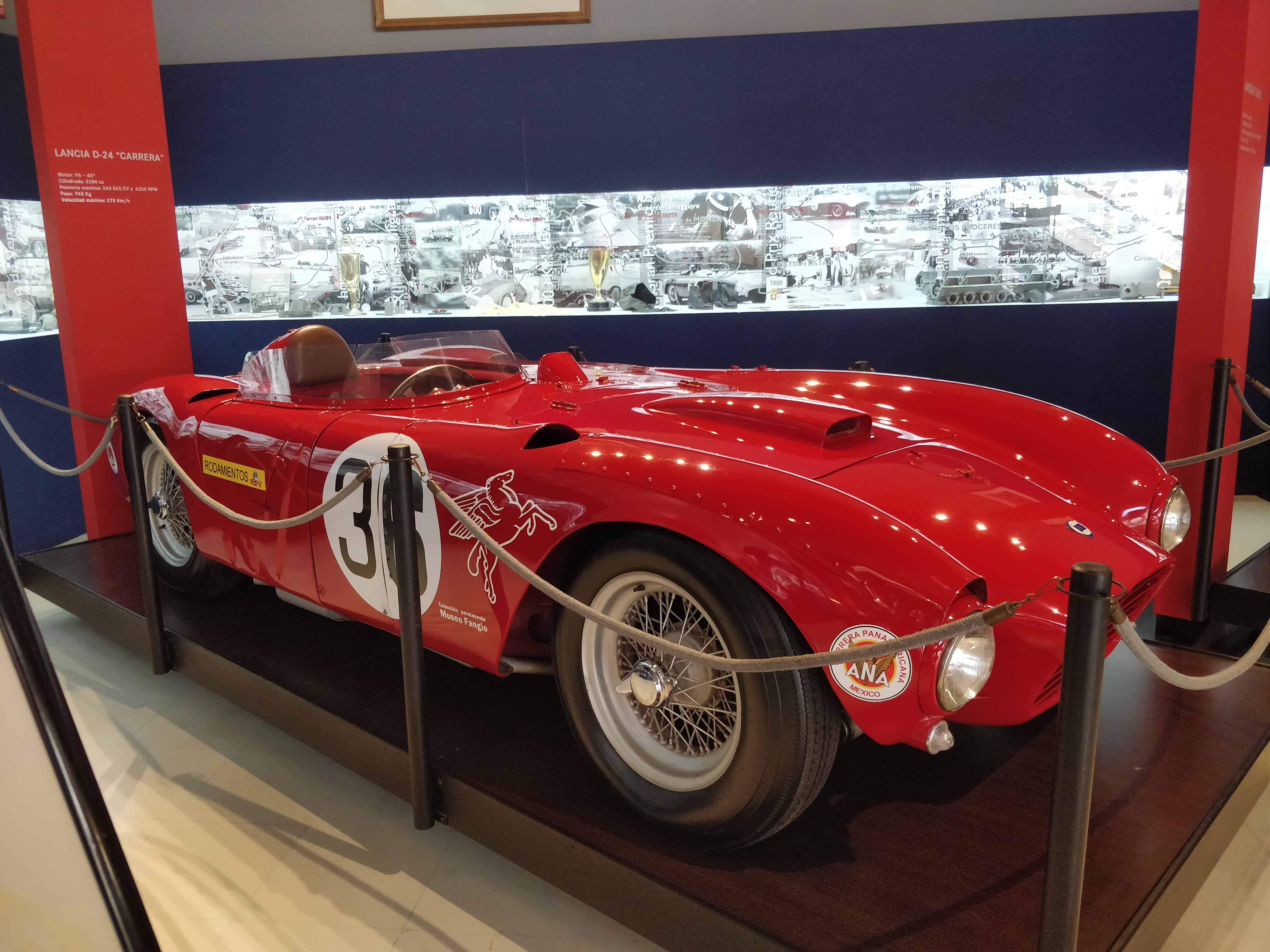 Lancia D-24 "Carrera" en el Museo Juan Manuel Fangio, Balcarce, Argentina